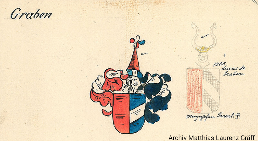 Wappen Lucas von Graben zum Stein. 1505. Burglechner, Matthias: Tirolischer Adler. Kopie nach Original im Haus-, Hof- und Staatsarchive in Wien (Archiv Matthias Laurenz Gräff)